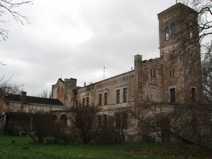 Mełno, pałac